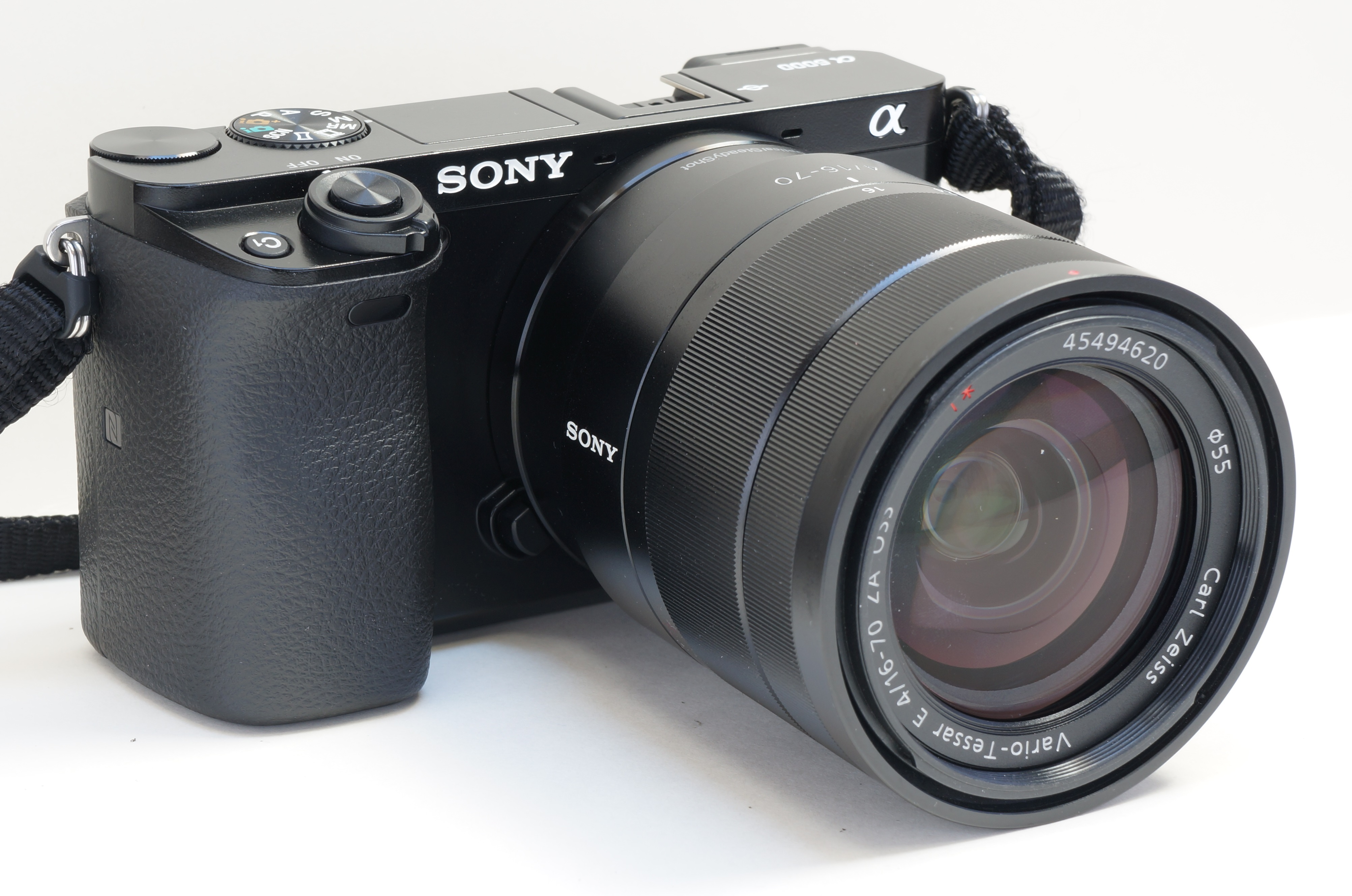 Sony Alpha ILCE-6000 et le zoom Zeiss 16-70 mm.